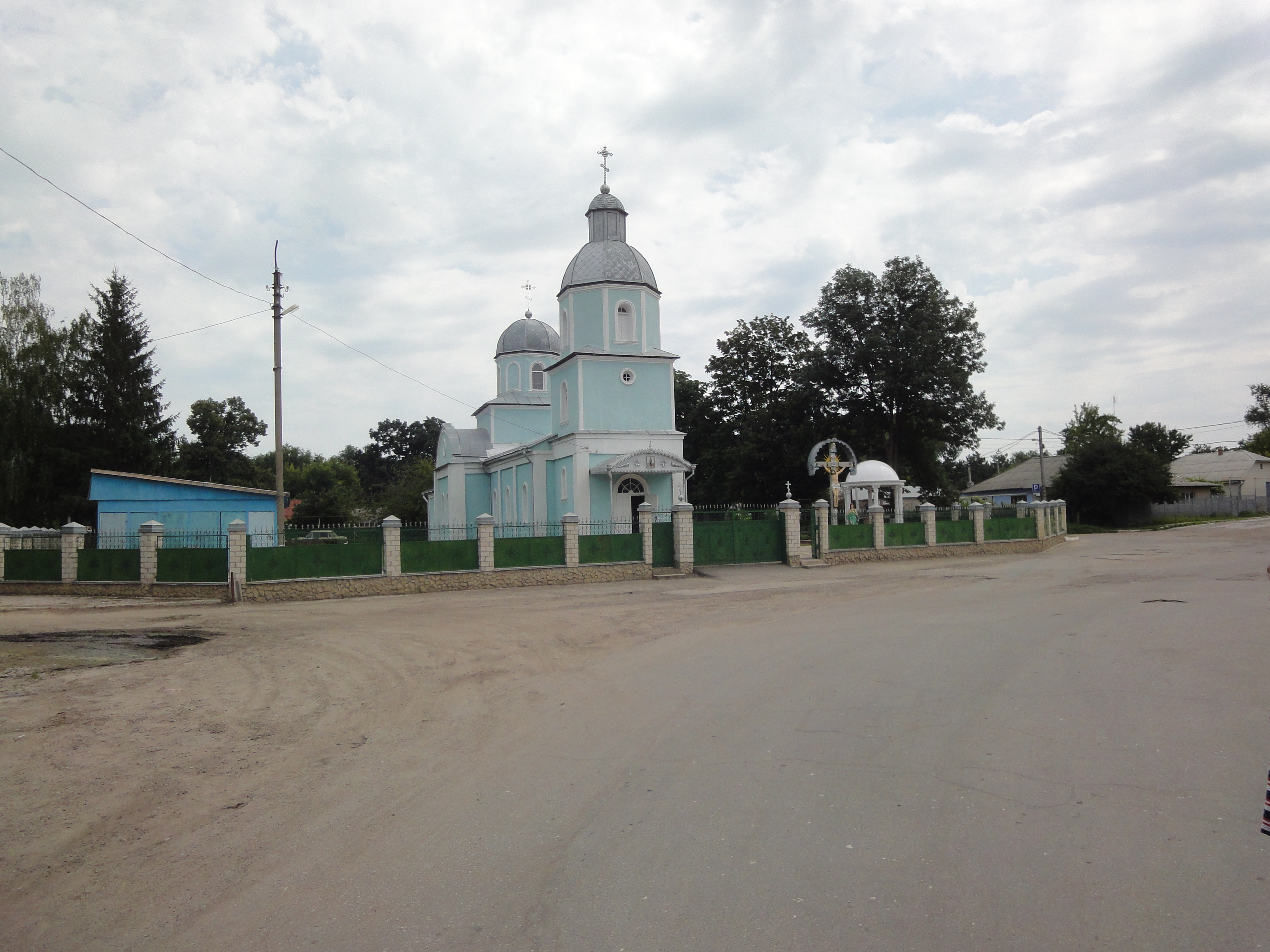 Leova, Moldova, Ortodox church